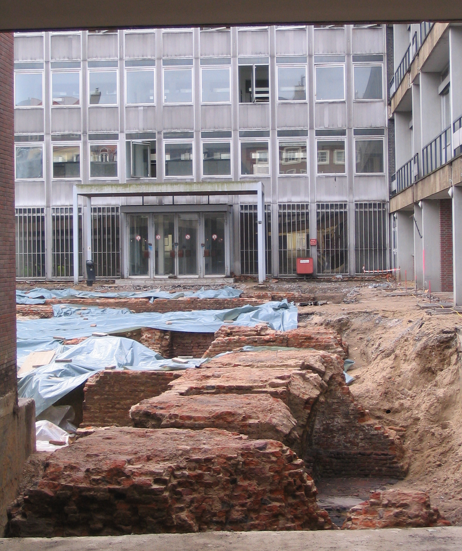 Ehemaliges Landgericht Düsseldorf, derzeit leerstehend, Ausgrabungen im Hof. Aufgenommen von der Neubrückstraße.